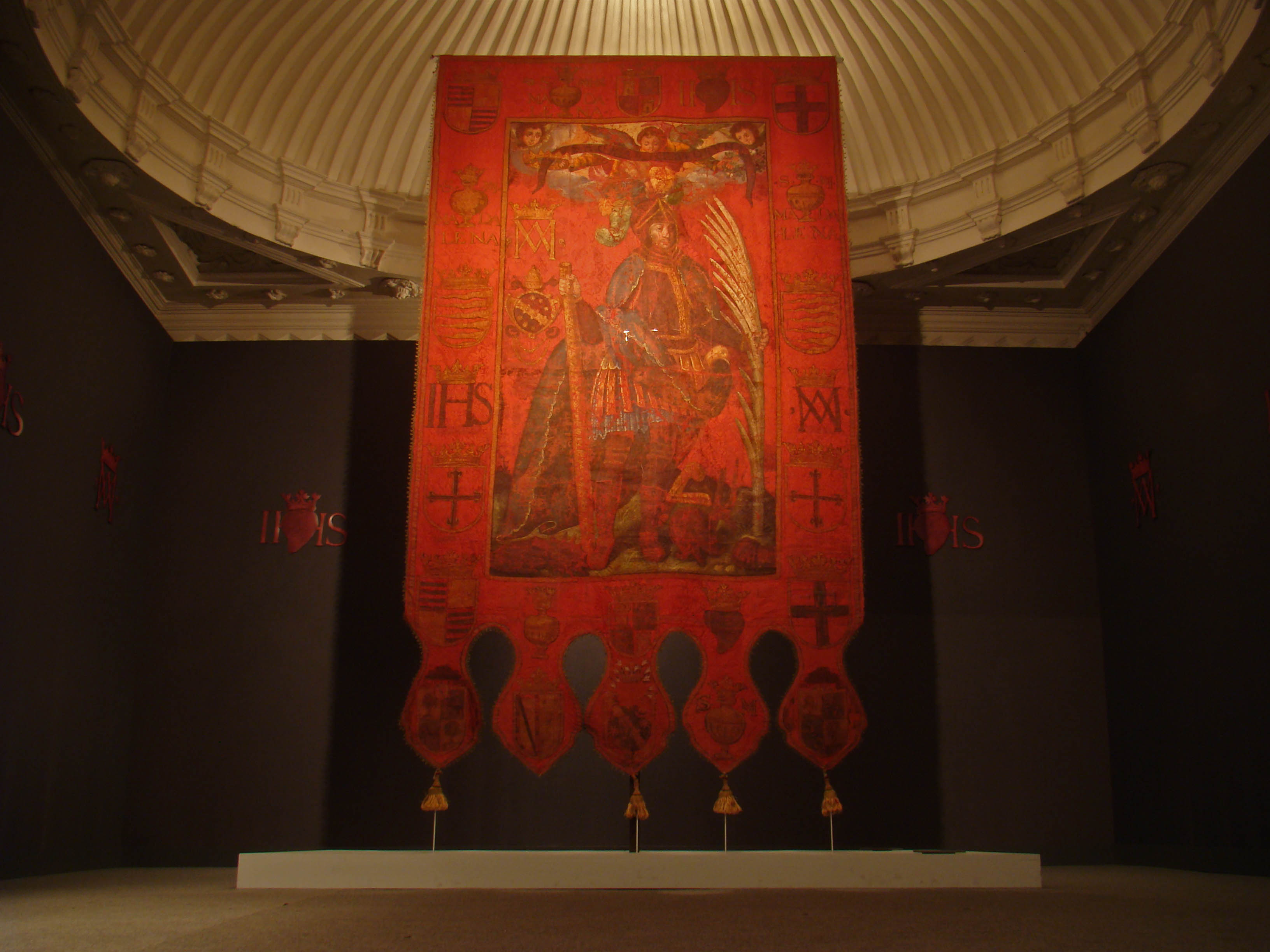 Confalón o estandarte de San Mauricio, jefe de la legión tebana de Roma, mártir cristiano que se encuentra custodiado en el Museo de Valladolid. Fue confeccionado con motivo de la gran procesión que hubo en esta ciudad para trasladar a la catedral las reliquias de santos tebanos.